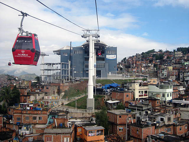 Fotos tiradas na saída fotográfica no Complexo do Alemão